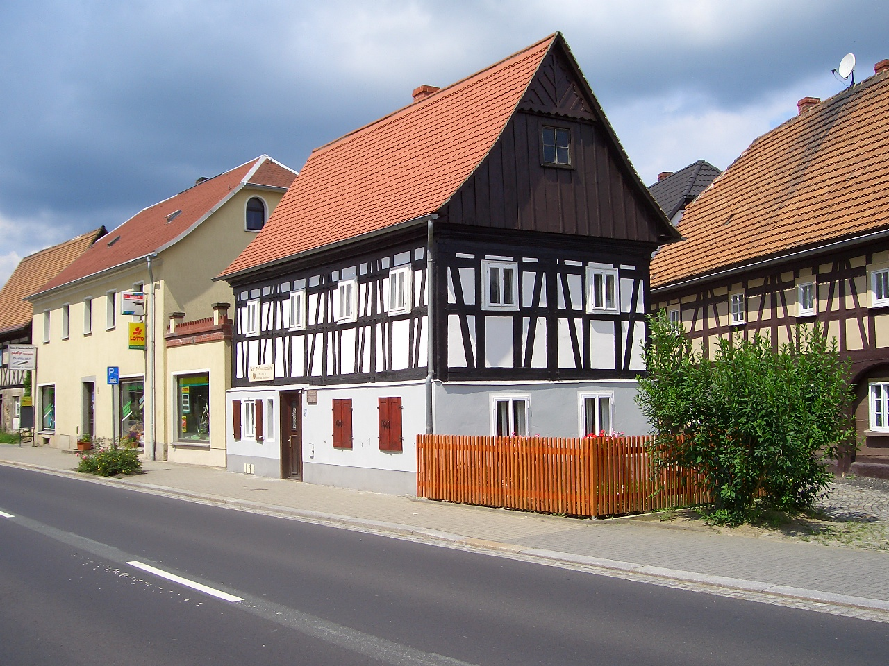 Elternhaus von Ernst Pinkert (1844–1909), Gründer des Leipziger Zoos, in 02788 Hirschfelde, Zittauer Straße 14. In den vergangenen drei Jahren erfolgten umfangreiche Sanierungsarbeiten am Haus. Am 29. Mai 2010 vergab die Stiftung Umgebindehaus der Landkreise Görlitz und Bautzen den Umgebindehaus-Preis des Jahres 2010 an den Museum Dittelsdorf e. V. – Arbeitskreis Geschichte Hirschfelde für die denkmalgerechte Sanierung.